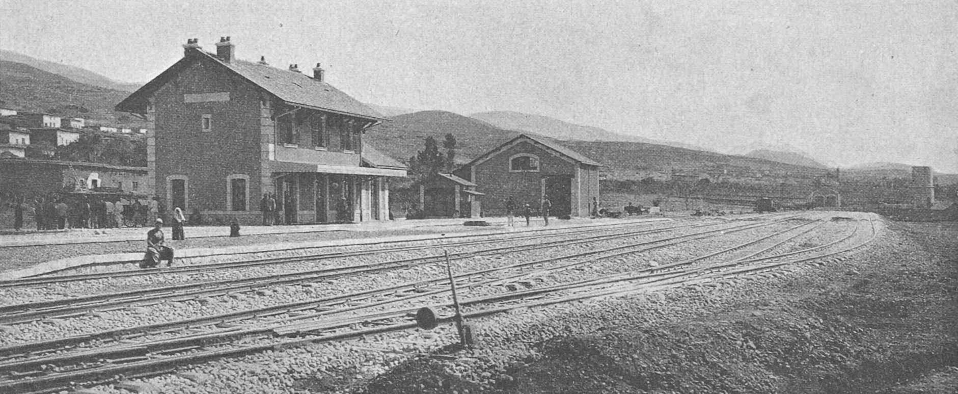 Station de Mallakah-Zahleh